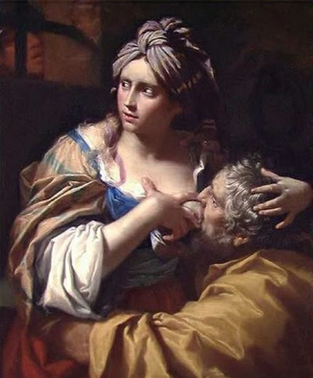 Roman Charity. Nasjonalgalleriet (Oslo).